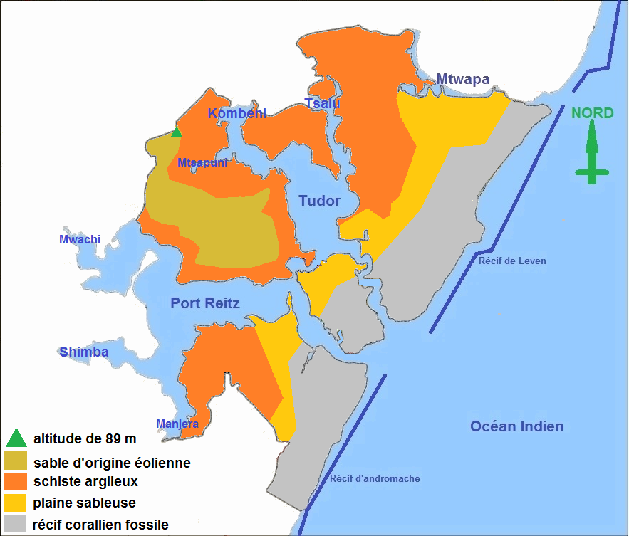 Carte hydrographique et géologique du comté de Mombasa au Kenya